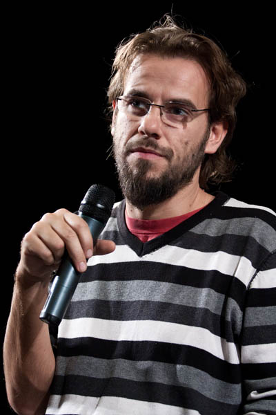 Il regista italiano Andrea Segre.